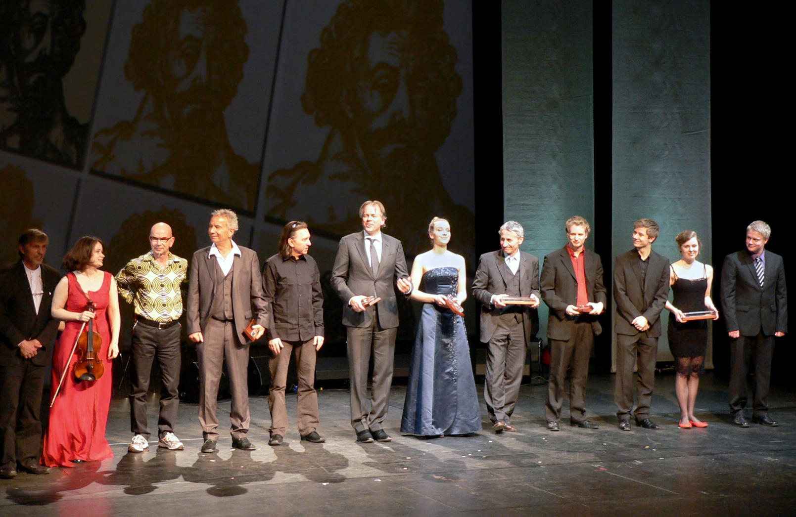 Preisträger des Praetorius Musikpreis 2012, von links nach rechts: Uve Müllrich (Dissidenten), Patricia Kopatchinskaja, Friedo Josch (Dissidenten), Harald Weiss, Marlon Klein (Dissidenten), Thomas Hengelbrock, Elisabeth Brauß, Christoph Hempel (IFF), Simon Etzold, Matthias Wagemann (Tritonüsse), Katharina Knaus (Tritonüsse), Henning Brungs (Tritonüsse)